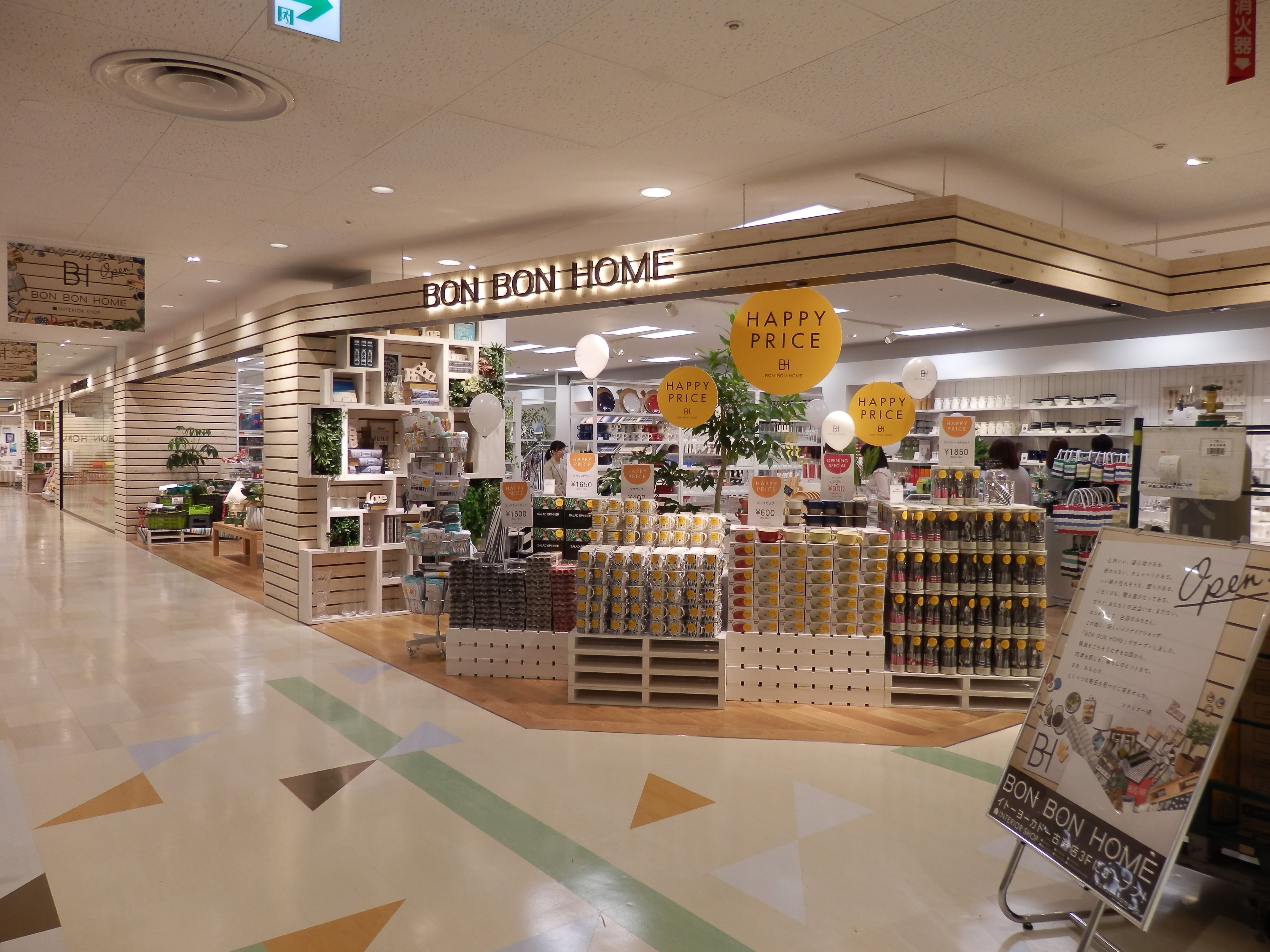 BON BON HOME